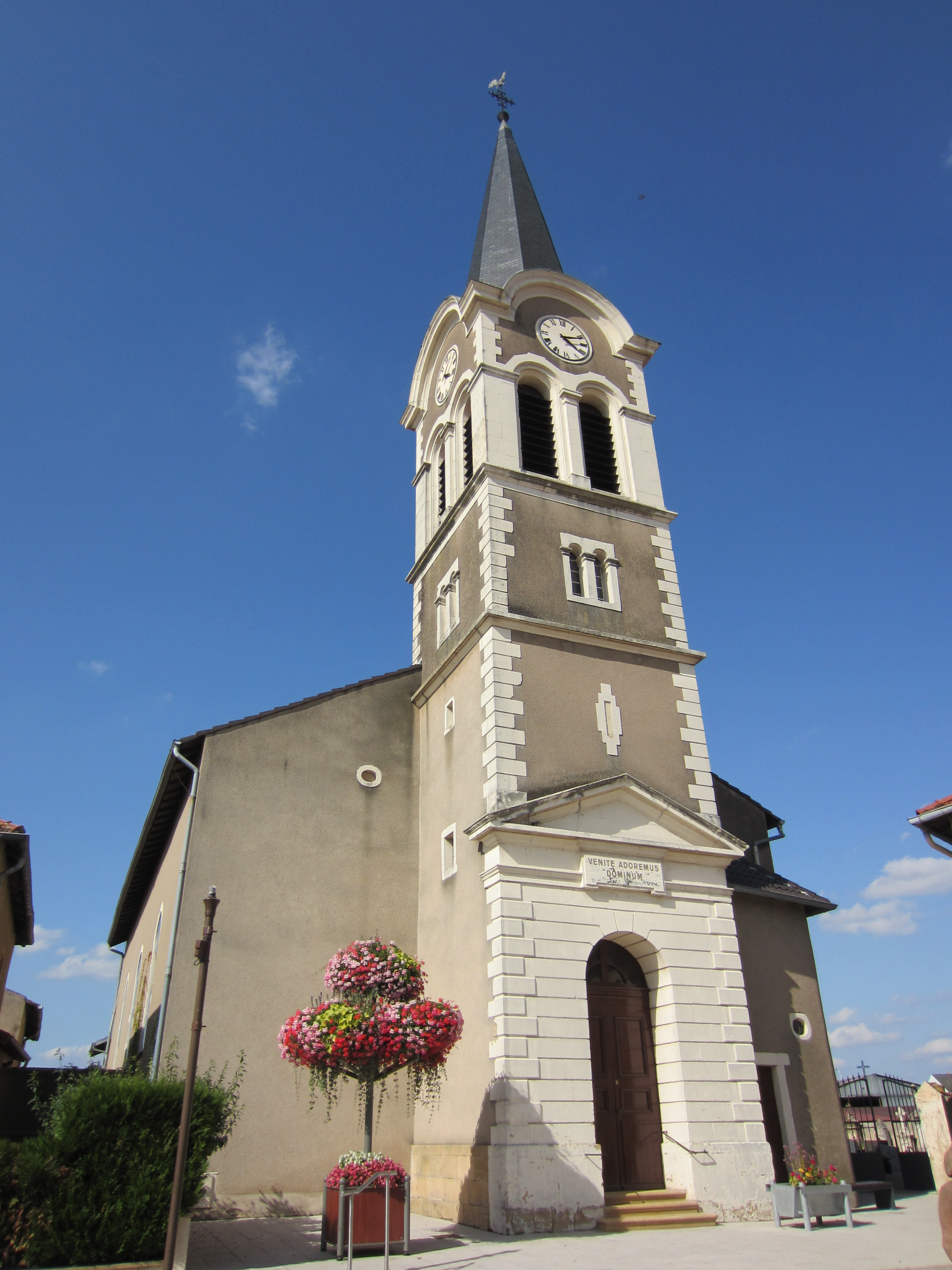 Description eglise Ay Moselle eglise Ay Moselle